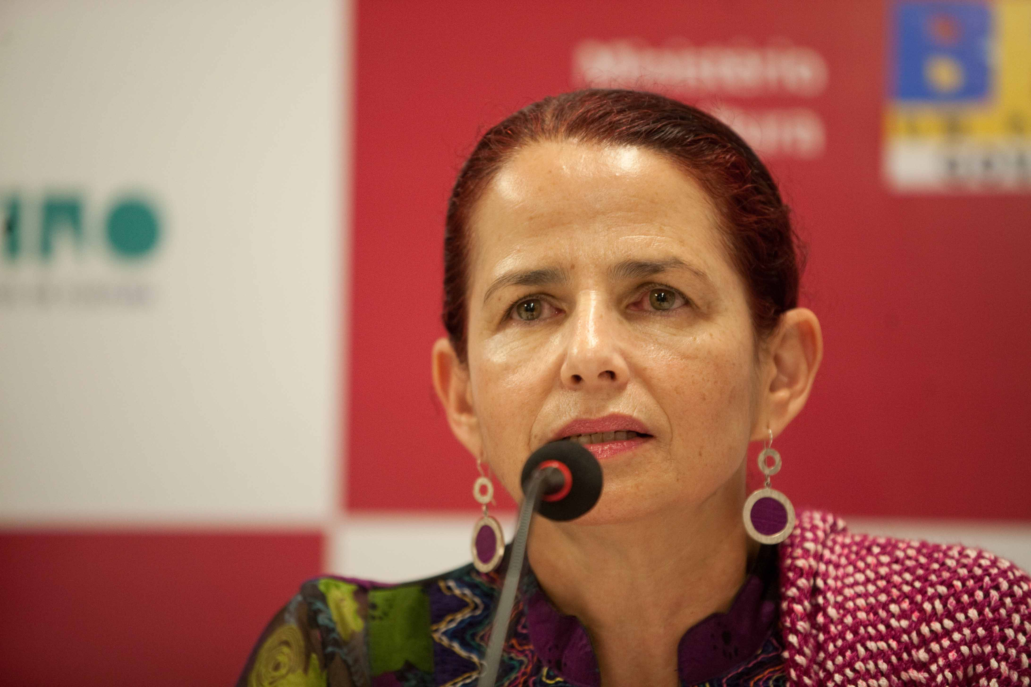 Coletiva de Imprensa com Paula Zapata (Ministra de Cultura da Colômbia), Juca Ferreira (Ministro da Cultura do Brasil), Zulu Araújo (Presidente da Fundação Palmares) e Erica Silva (Ministra da Cultura do Equador)